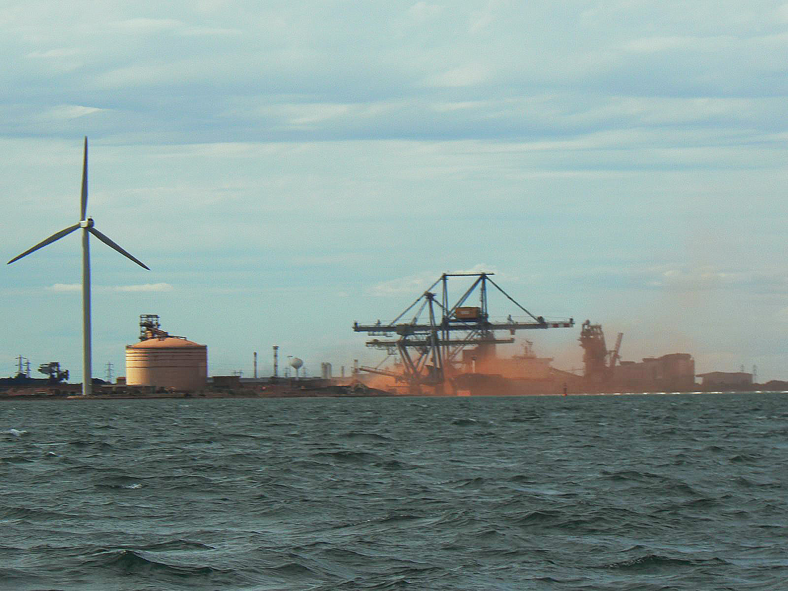 Le port de marchandises de Port-Saint-Louis-du-Rhône